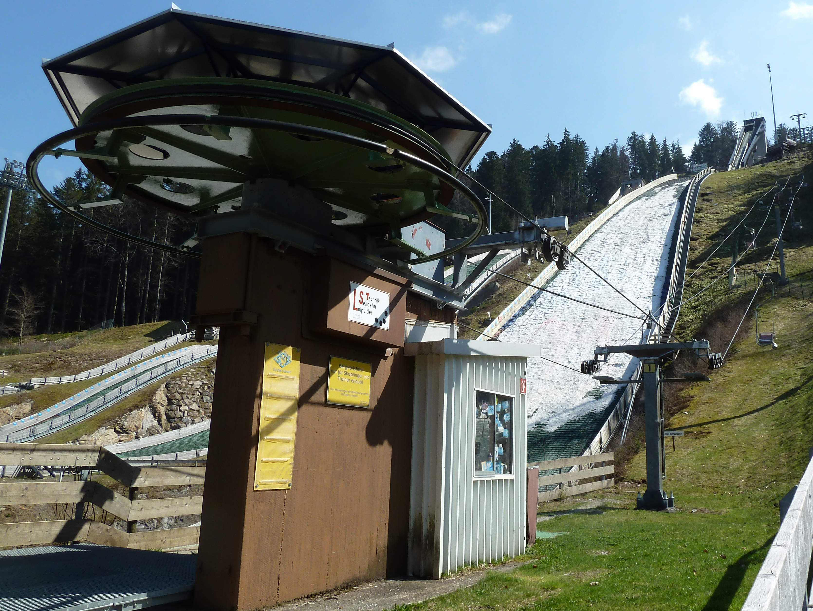 Sessellift im Adlerskistadion von Hinterzarten